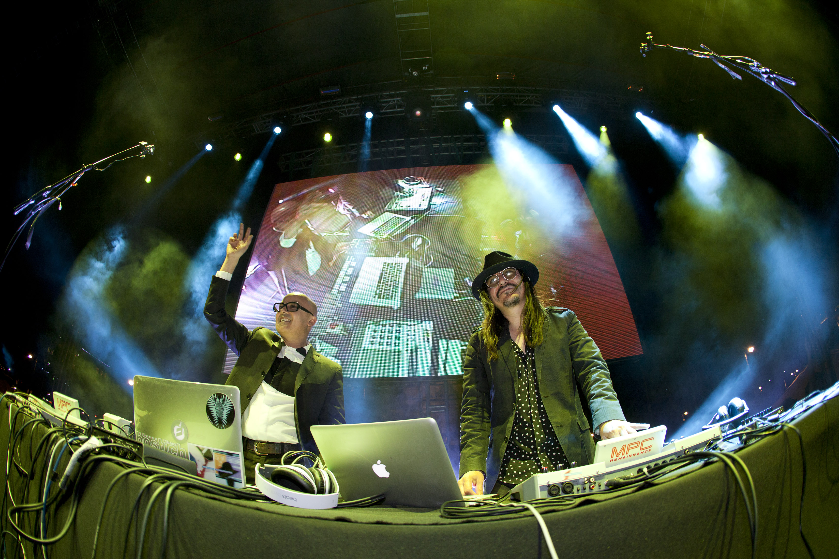 Domingo, 23 de Marzo 2014 Como parte de la clausura del 30vo Festival Centro Historico Mexico, se llevo a cabo el concierto masivo en el que participaron los grupos Mercan Dede Secret Tribe, Triciclo Circus Band, Dzambo Agusevi y la Orquesta Filarmonica de la Ciudad de Mexico con el Colectivo Nortec (Bostich y Fussible). Foto: Antonio Nava / Secretaria de Cultura